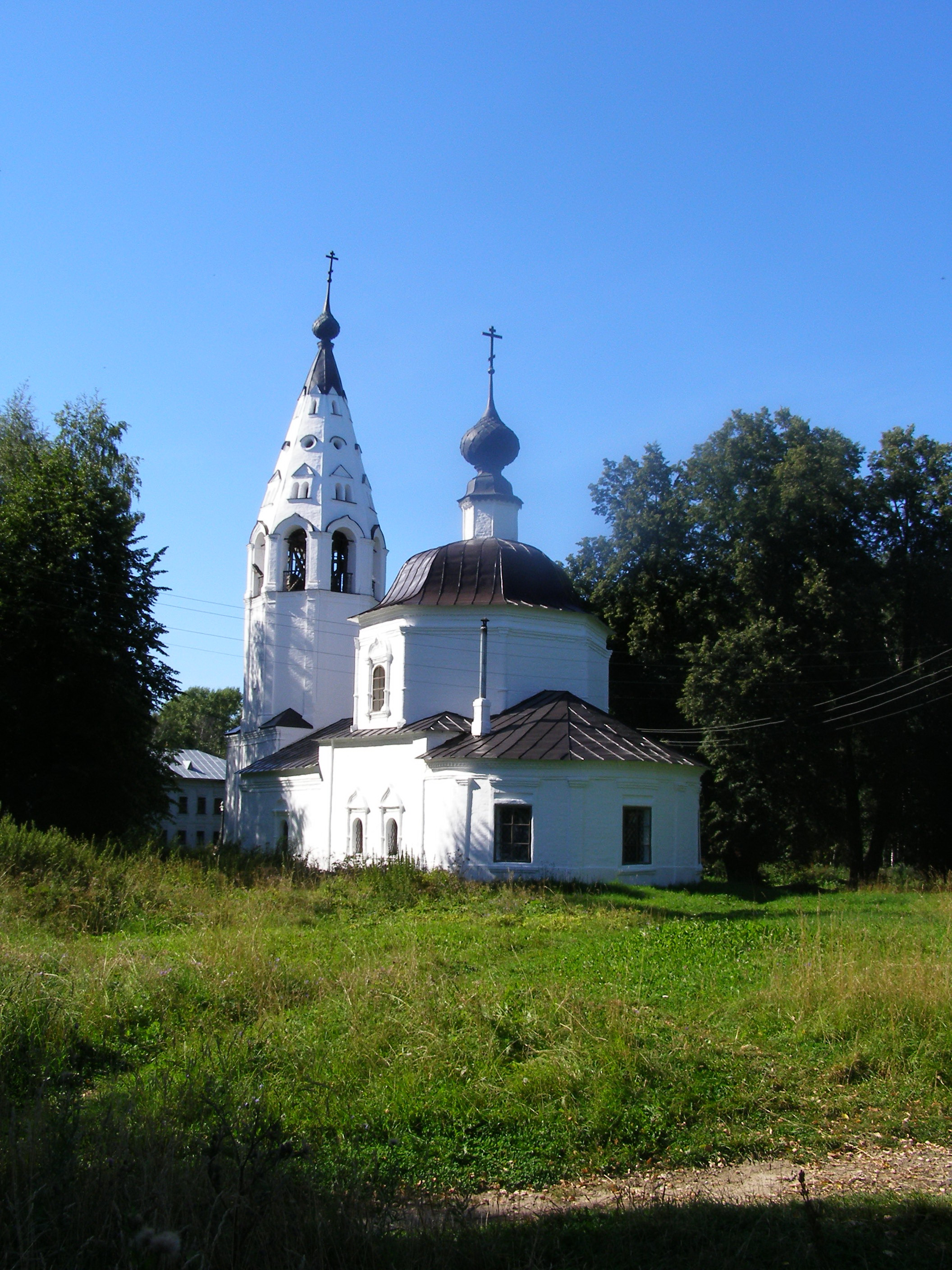 Зимний храм Успенского собора (1699 г.) расположенный в Плёсе на "Соборной горе"